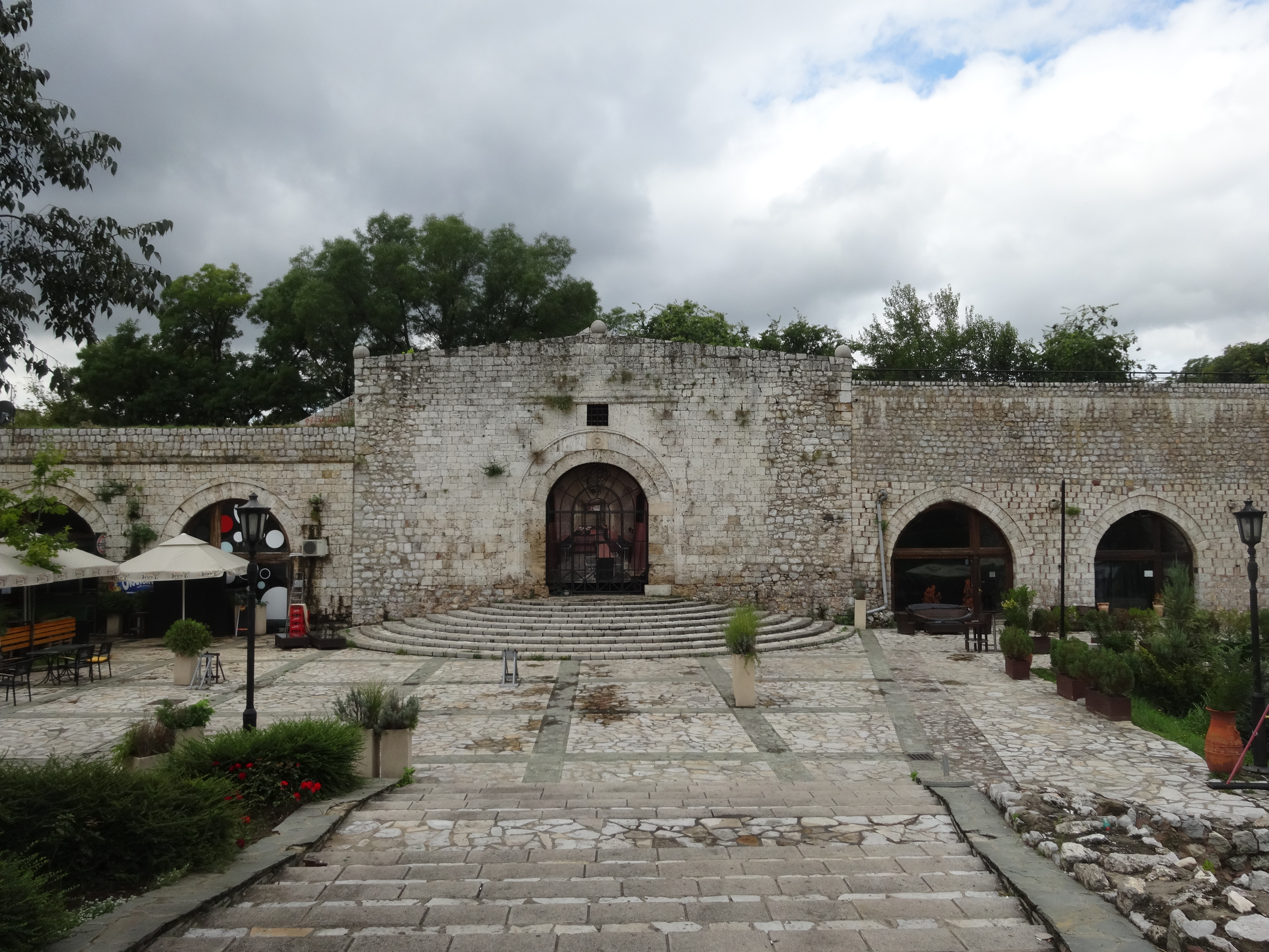 Beogradska kapija sa nišanima.